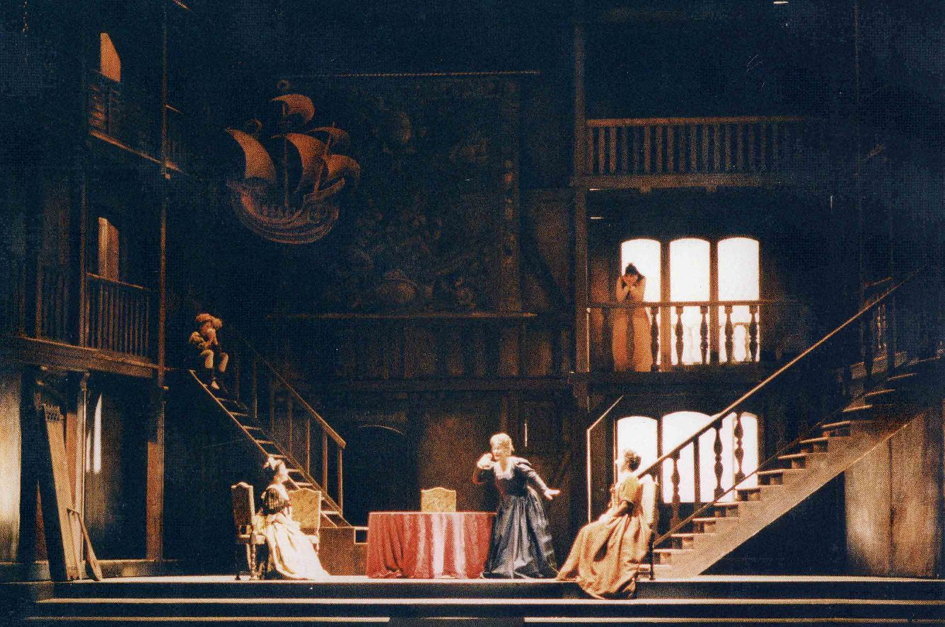 Giuseppe Verdi, Falstaff (Modena, 1987) Regia di Göran Järvefelt, scenografia di Koki Fregni, costumi di Nica Magnani